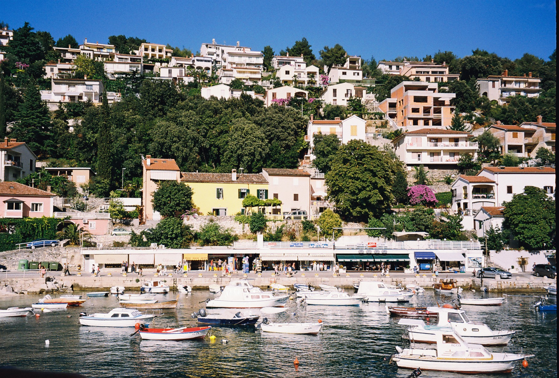 Srpskohrvatski / српскохрватски: Rabac luka